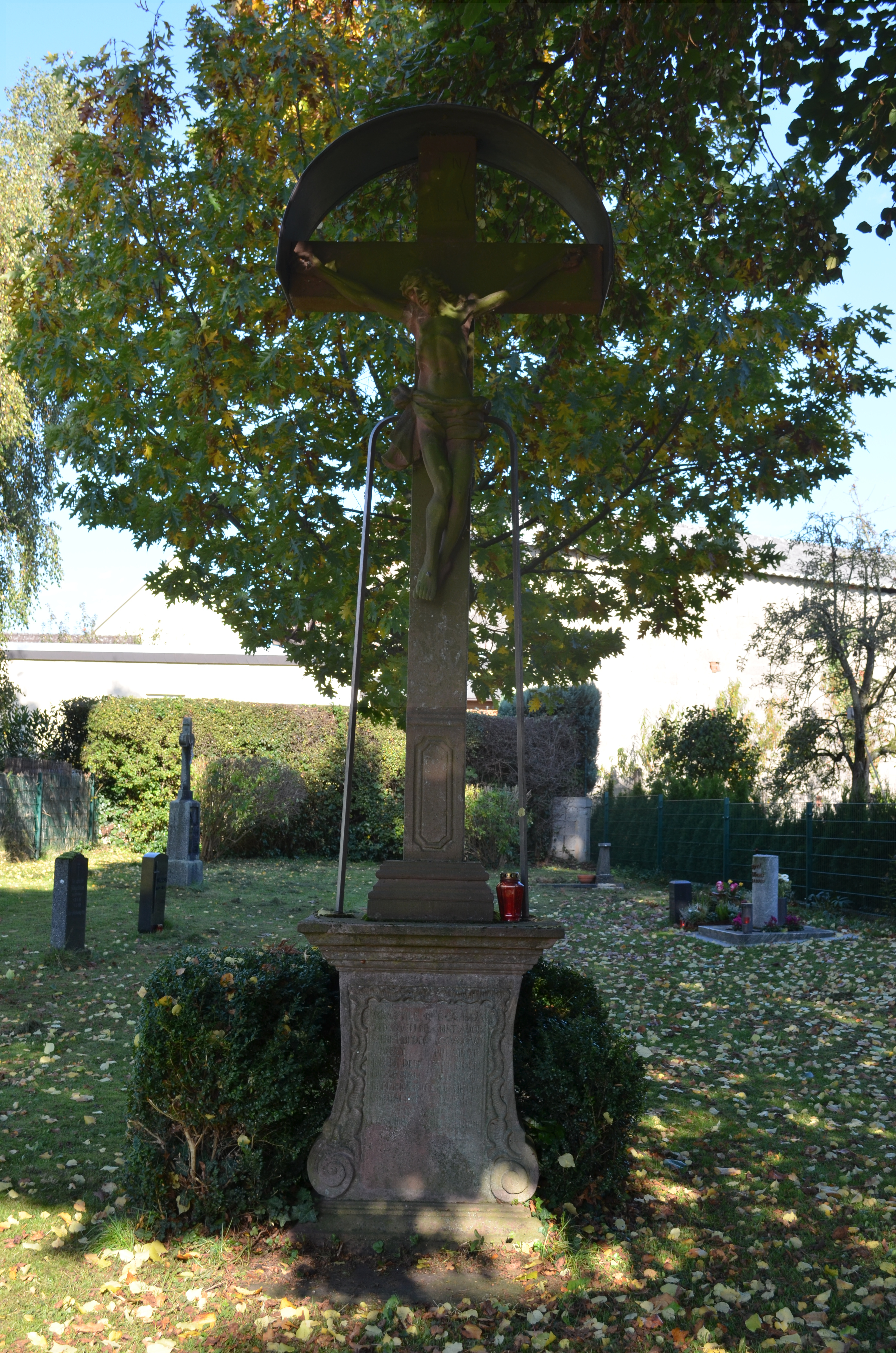 Burgholzhausen, Ober-Erlenbacher Straße 4, Wegekreuz